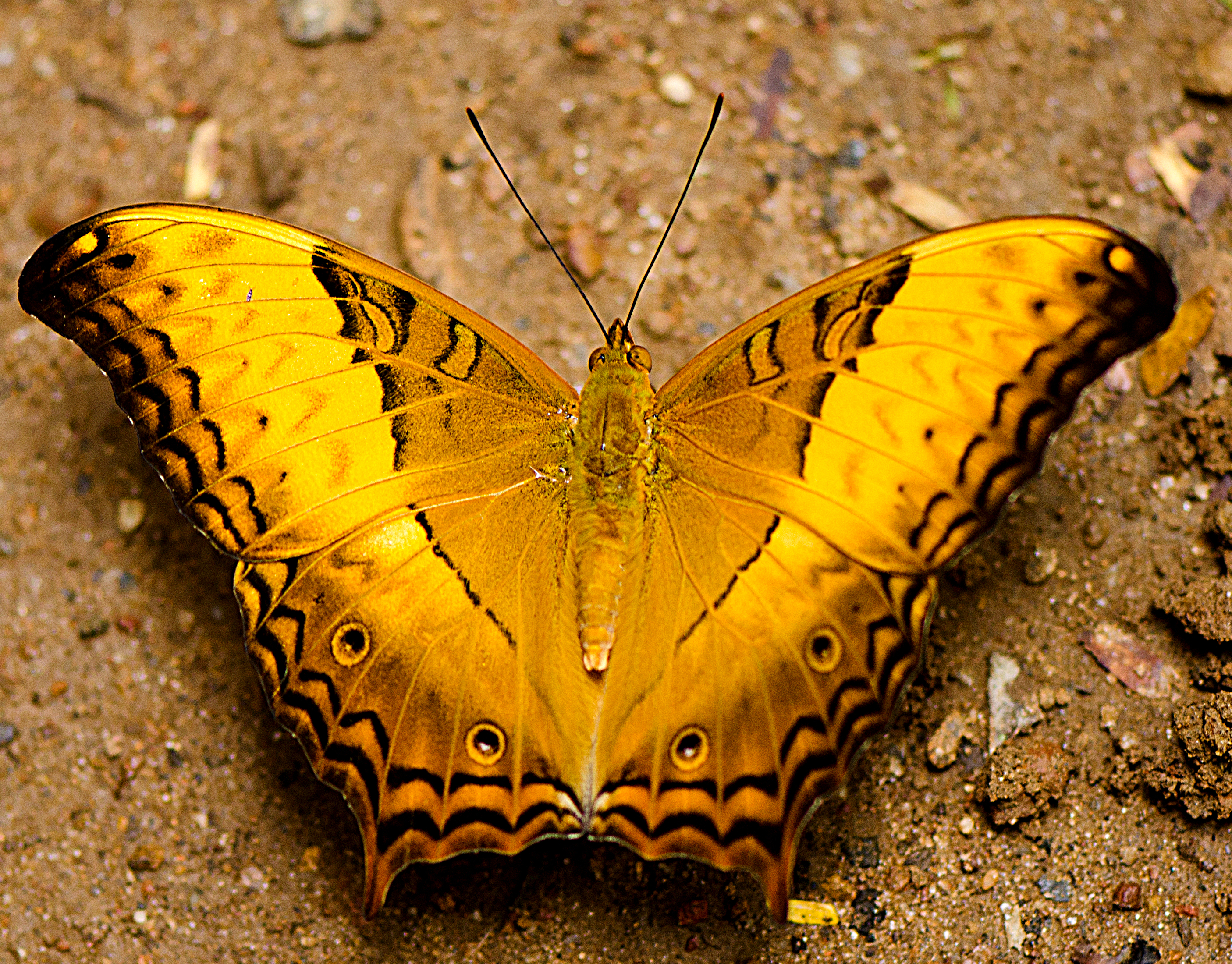 From Aralam WLS